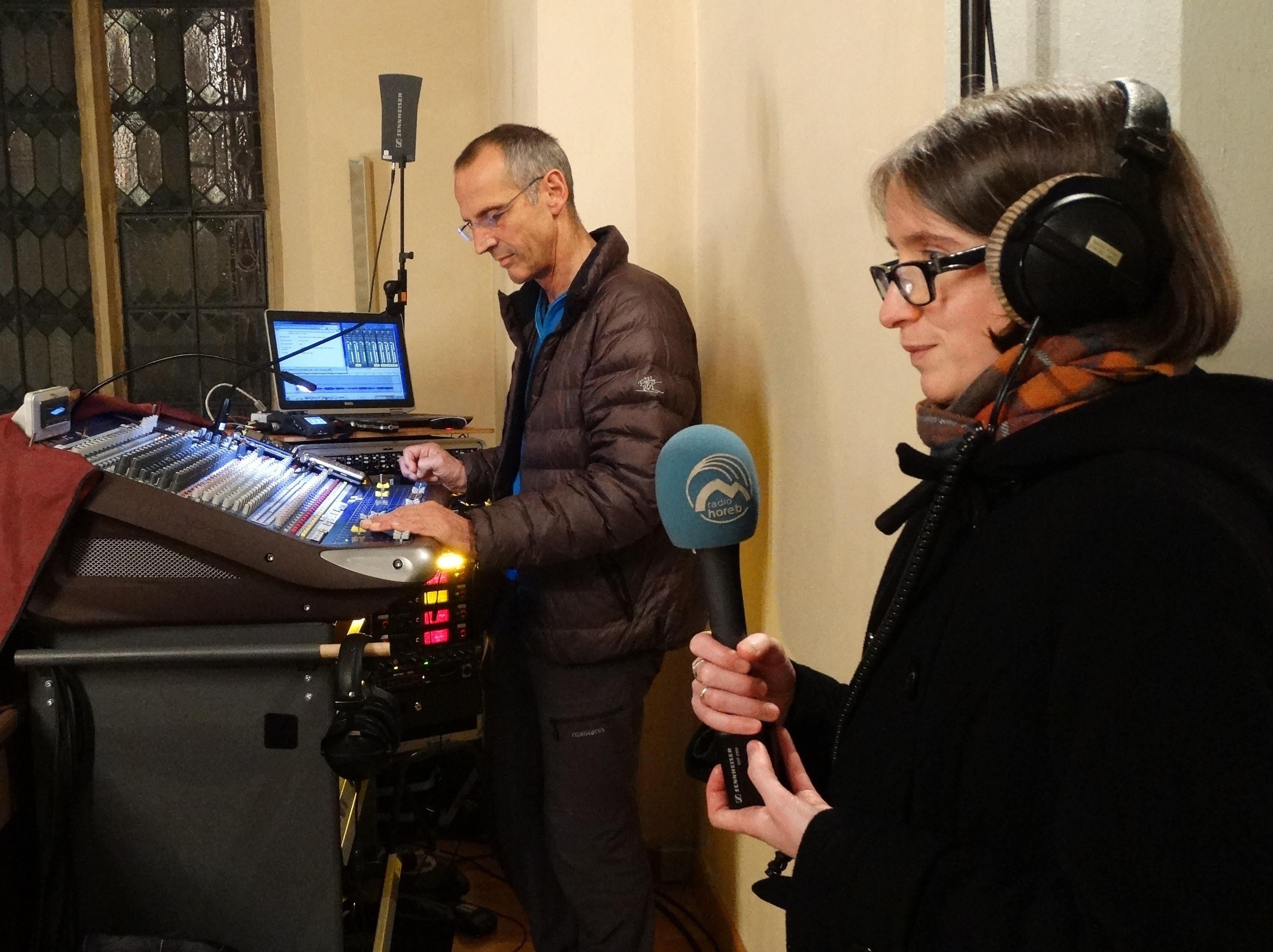 Dr. Barbara Stühlmeyer während einer Live-Übertragung mit Radio Horeb am 3. November 2013.